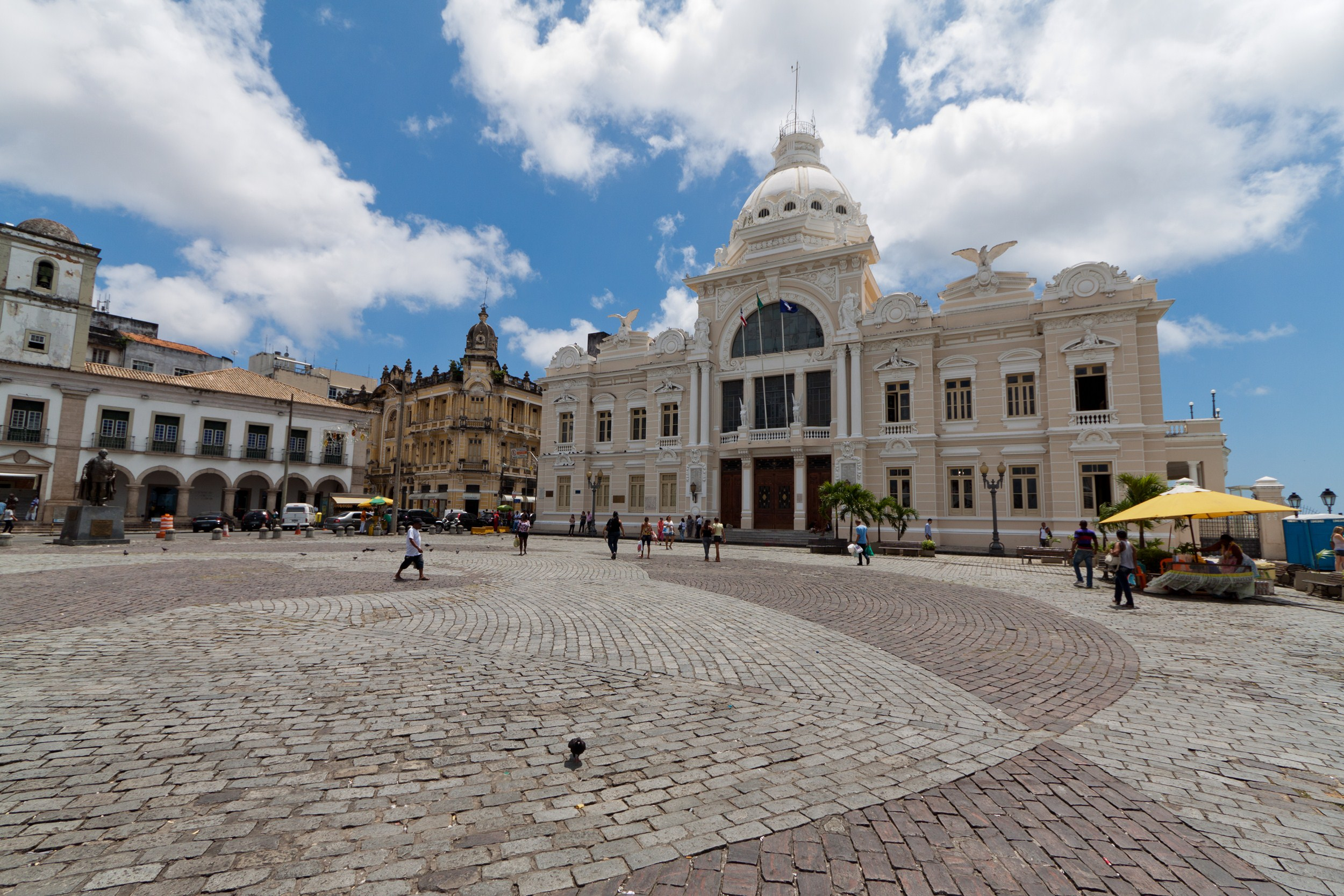 A Praça Tomé de Souza, ao fundo o Palácio Rio Branco (à direita) e a Câmara Municipal de Salvador (à esquerda).